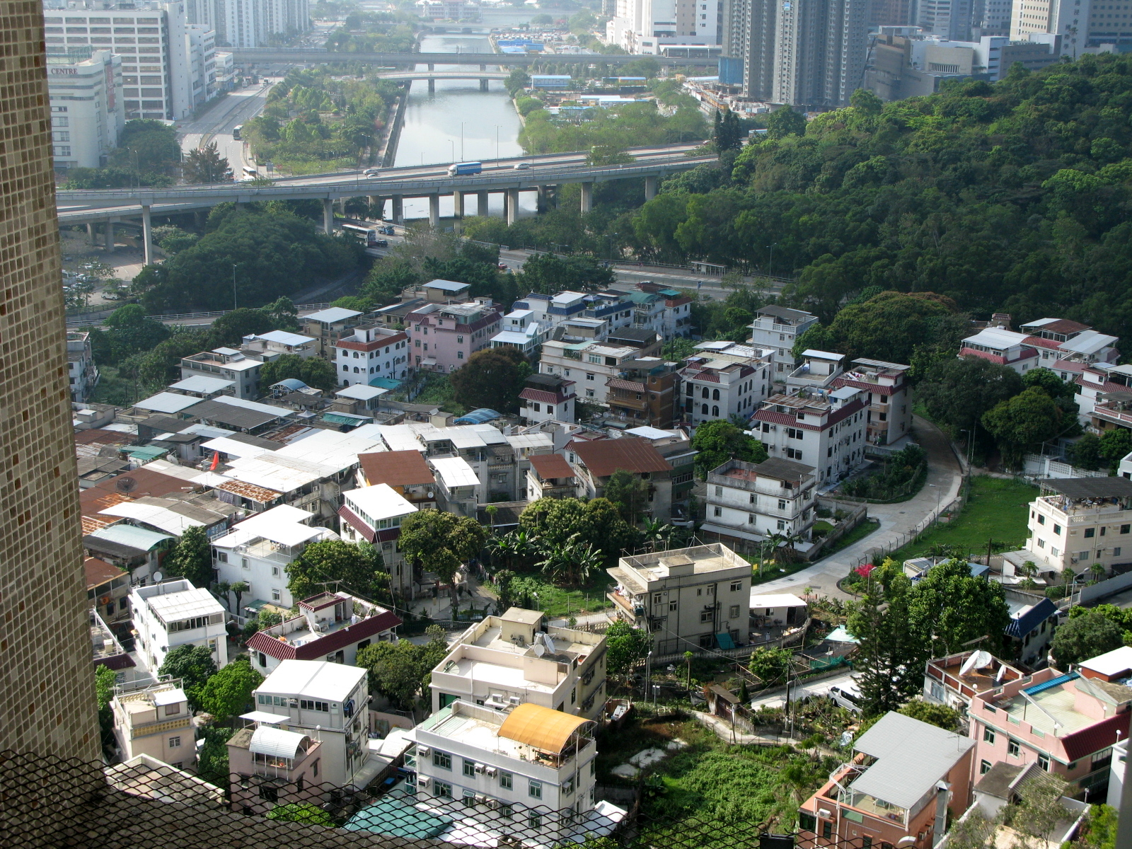 North Yeuk Siu Lek Yuen